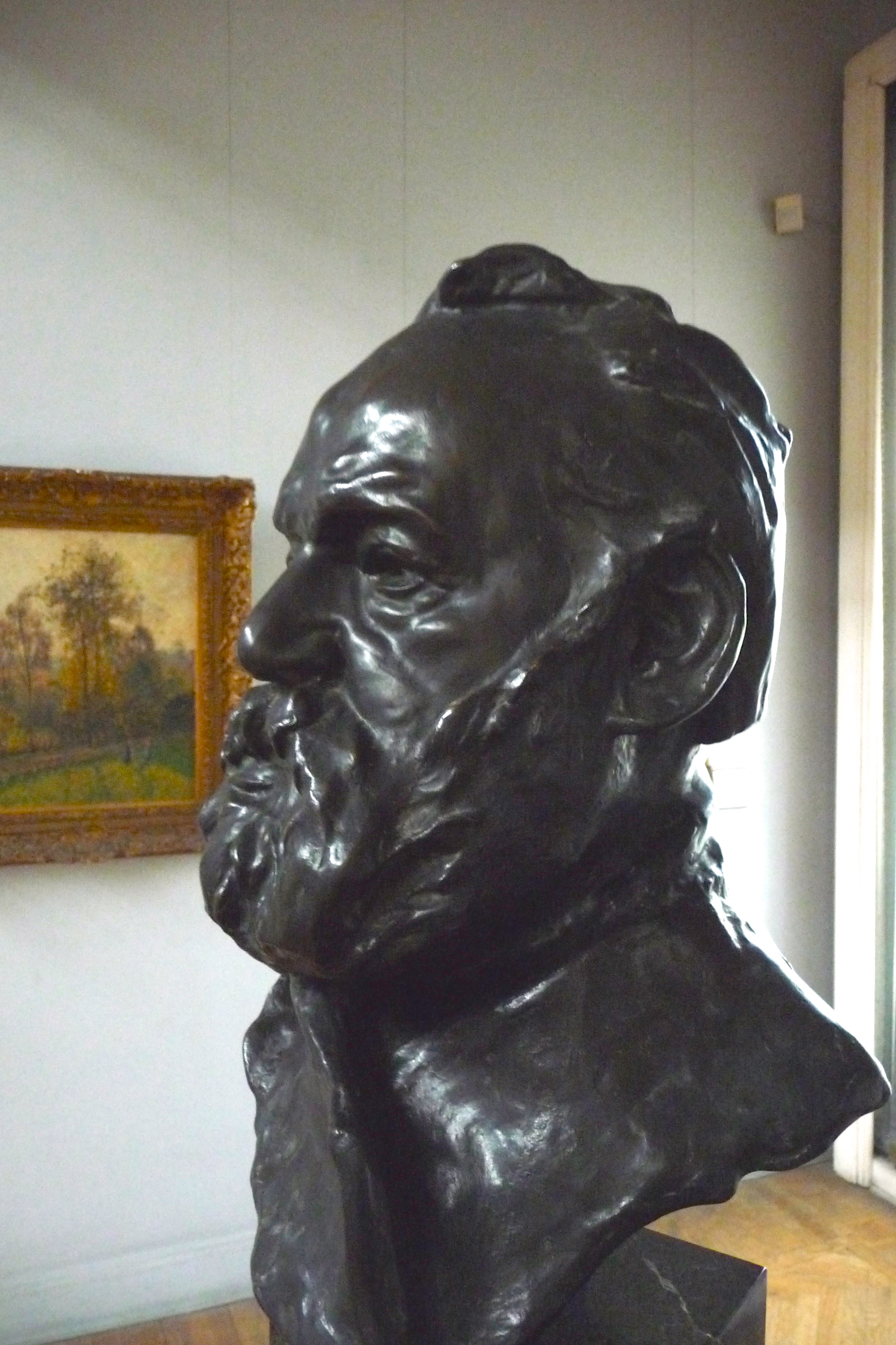 Auguste Rodin Mahmoud Khalil Museum Kairo